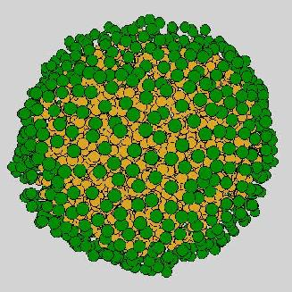 ตัวอย่างของกลุ่มก้อนเล็กๆที่เราศึกษาในเรื่องขั้นตอนวิธีแบบกรวย เป็นดังรูปข้างใต้นี้ วงกลมสีเขียวเป็นอนุภาคที่อยู่บนพื้นผิว และสีเหลืองคือ อนุภาคที่อยู่ภายใน